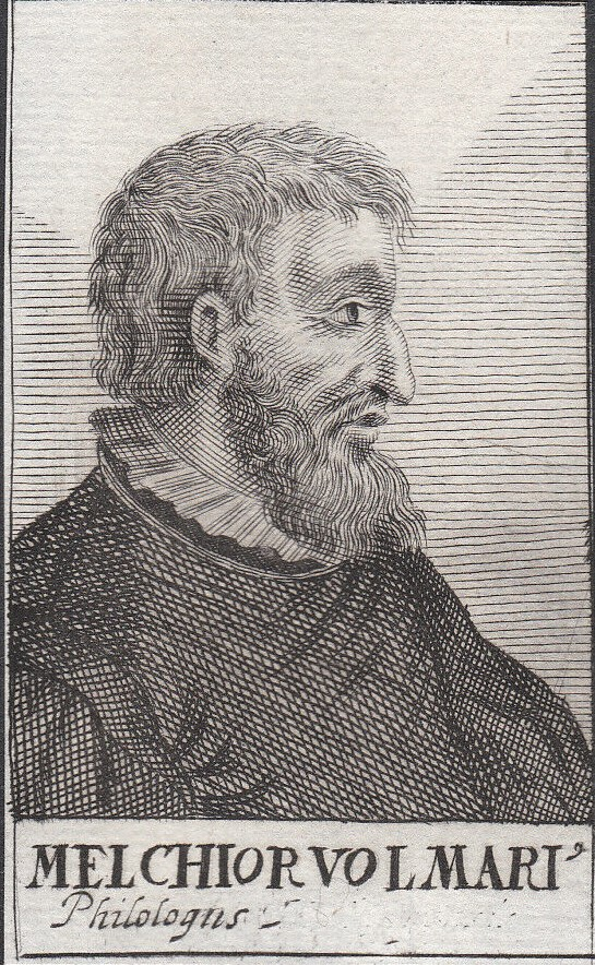 Melchior Volmar (Kupferstich, Blattmaße: ca. 4 cm × 8 cm)